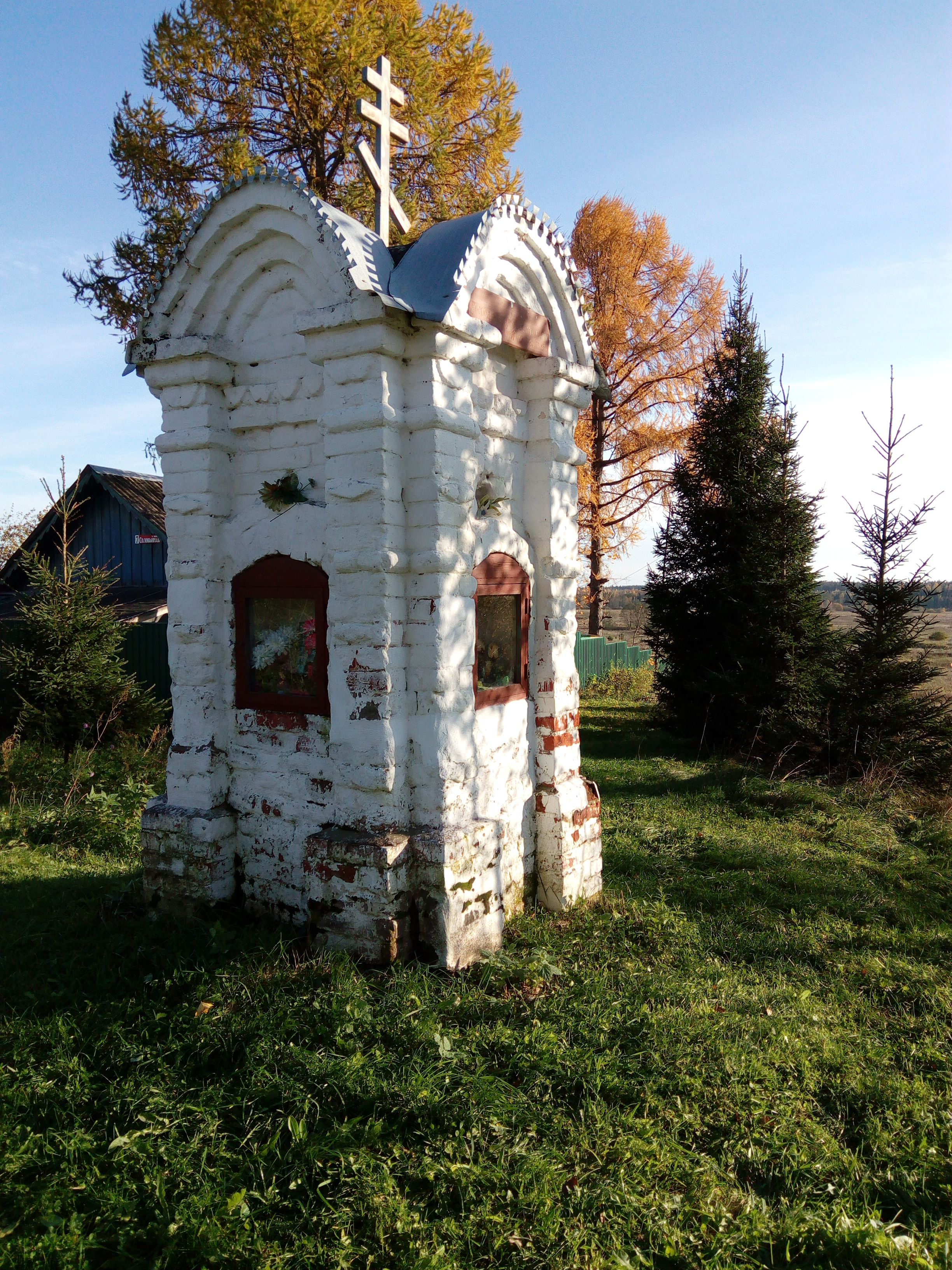 Столб придорожный: Бережки, Киржачский район, Владимирская область